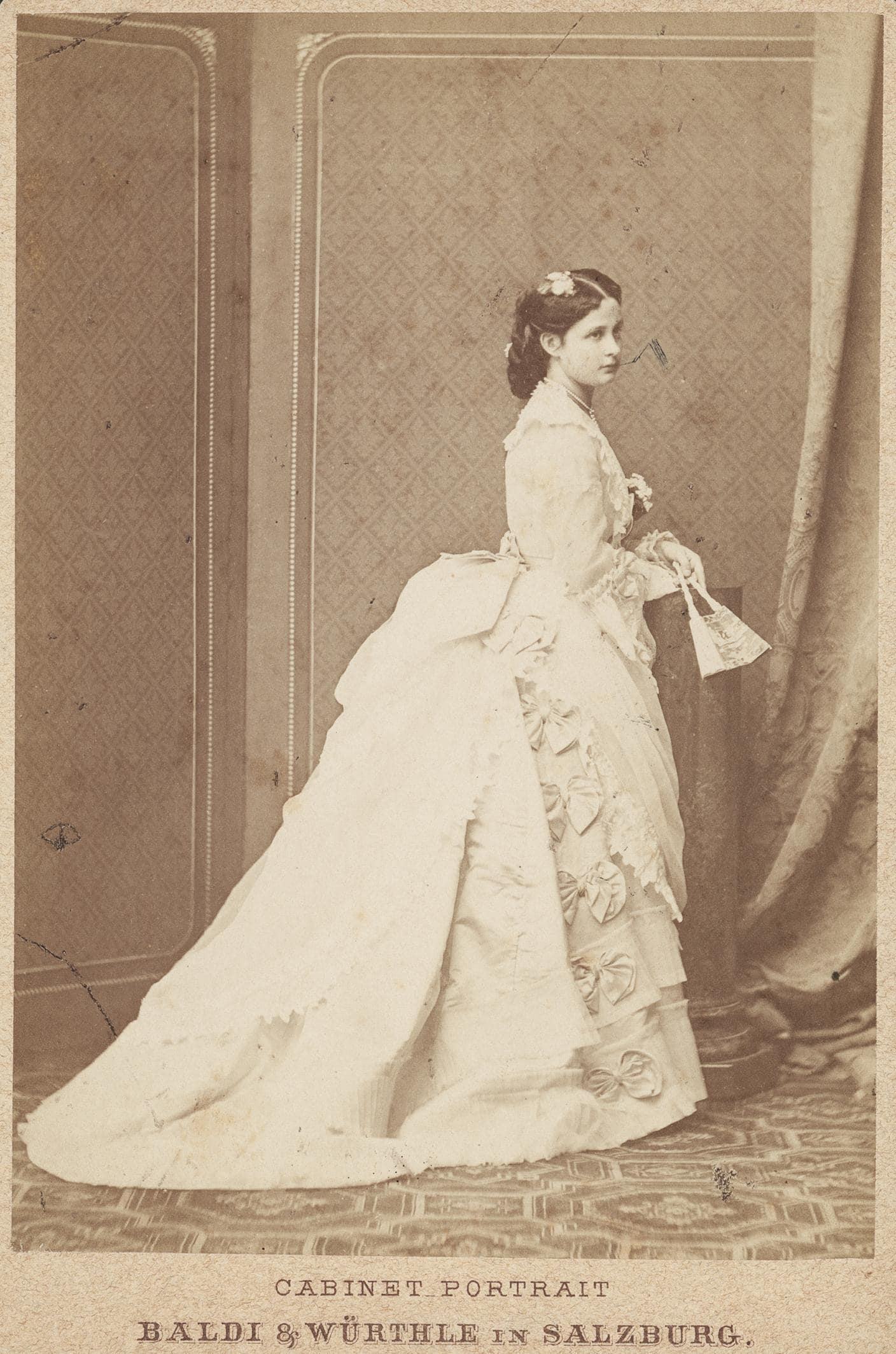 Bildnis (: ganze Figur stehend, fast Rechtsprofil; weißes Kleid mit Schleppe)